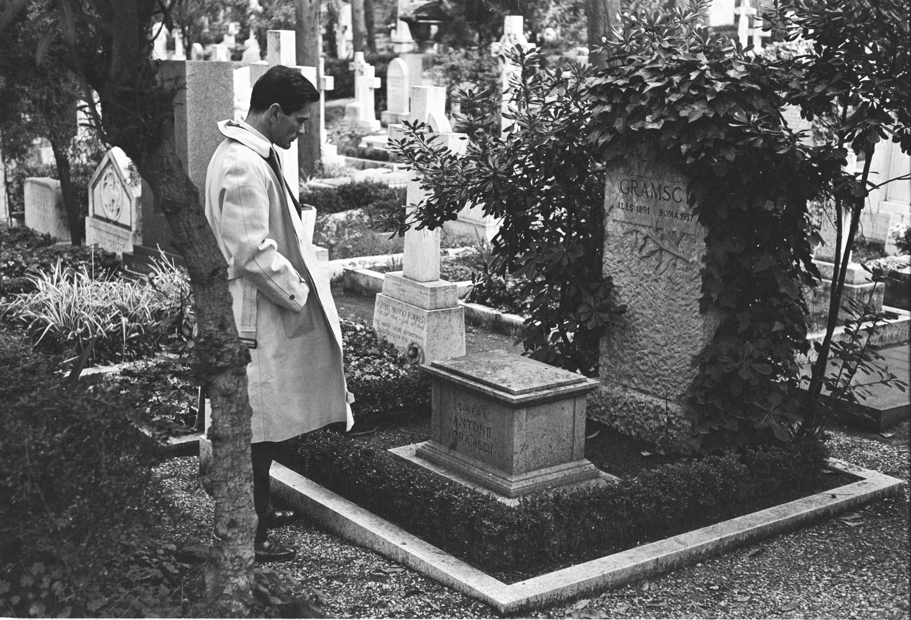 Pasolini davanti alla tomba di Gramsci Fonte: Ansa Foto ca 1970